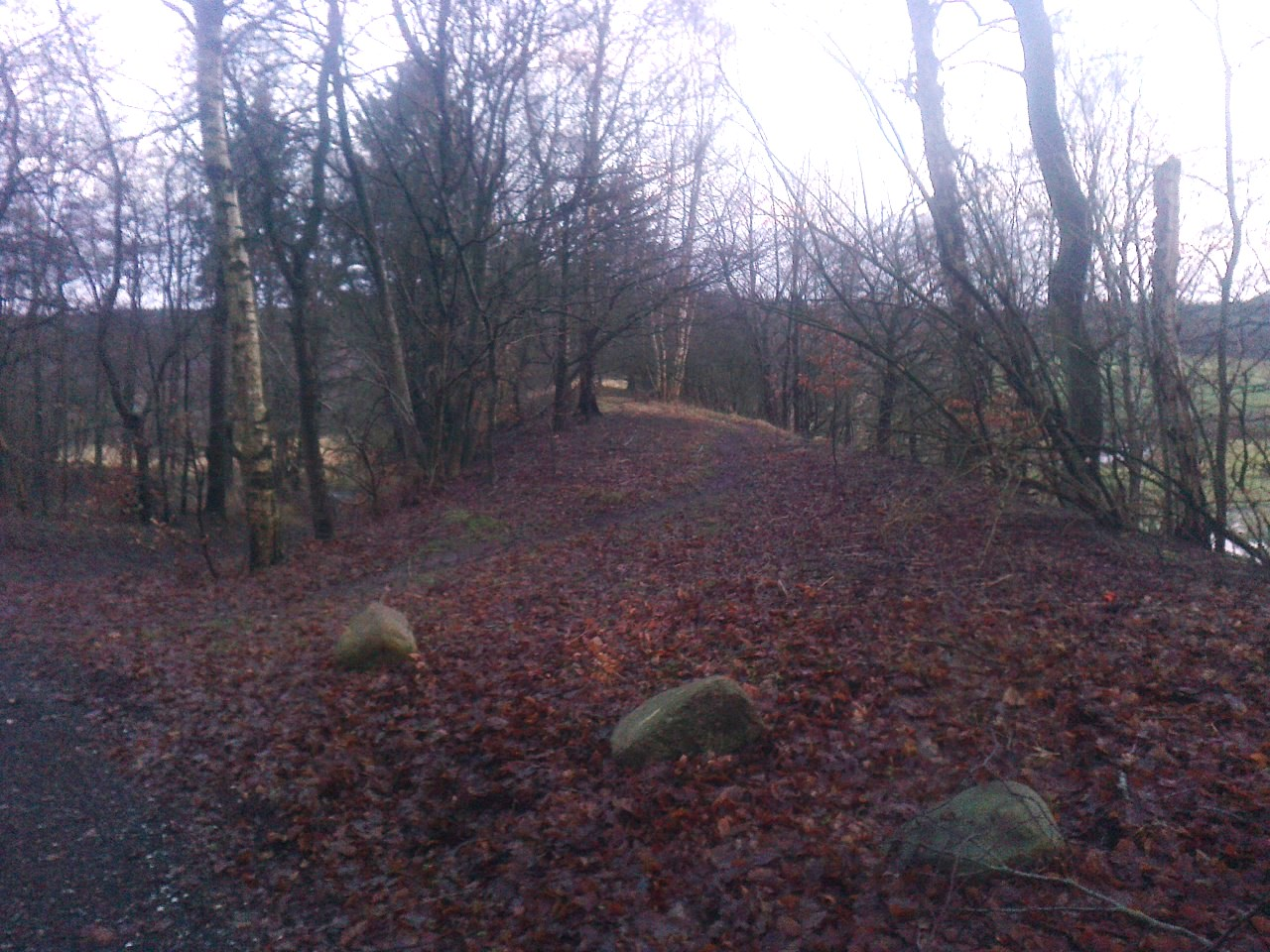 Kig tilbage mod dæmningen